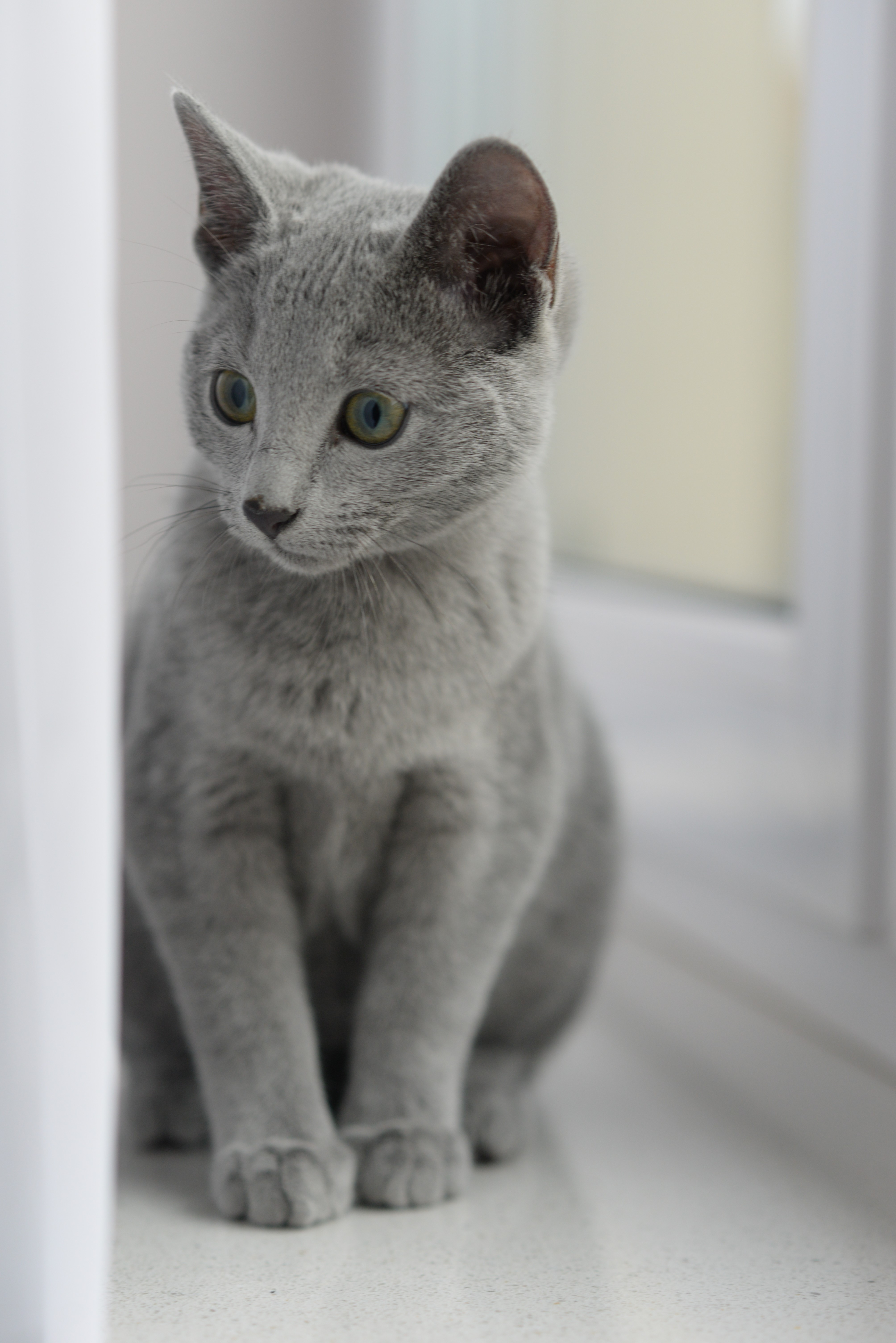 Kotka rosyjska niebieska w wieku 4 miesięcy